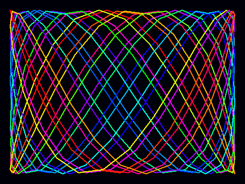 Lissajous curve